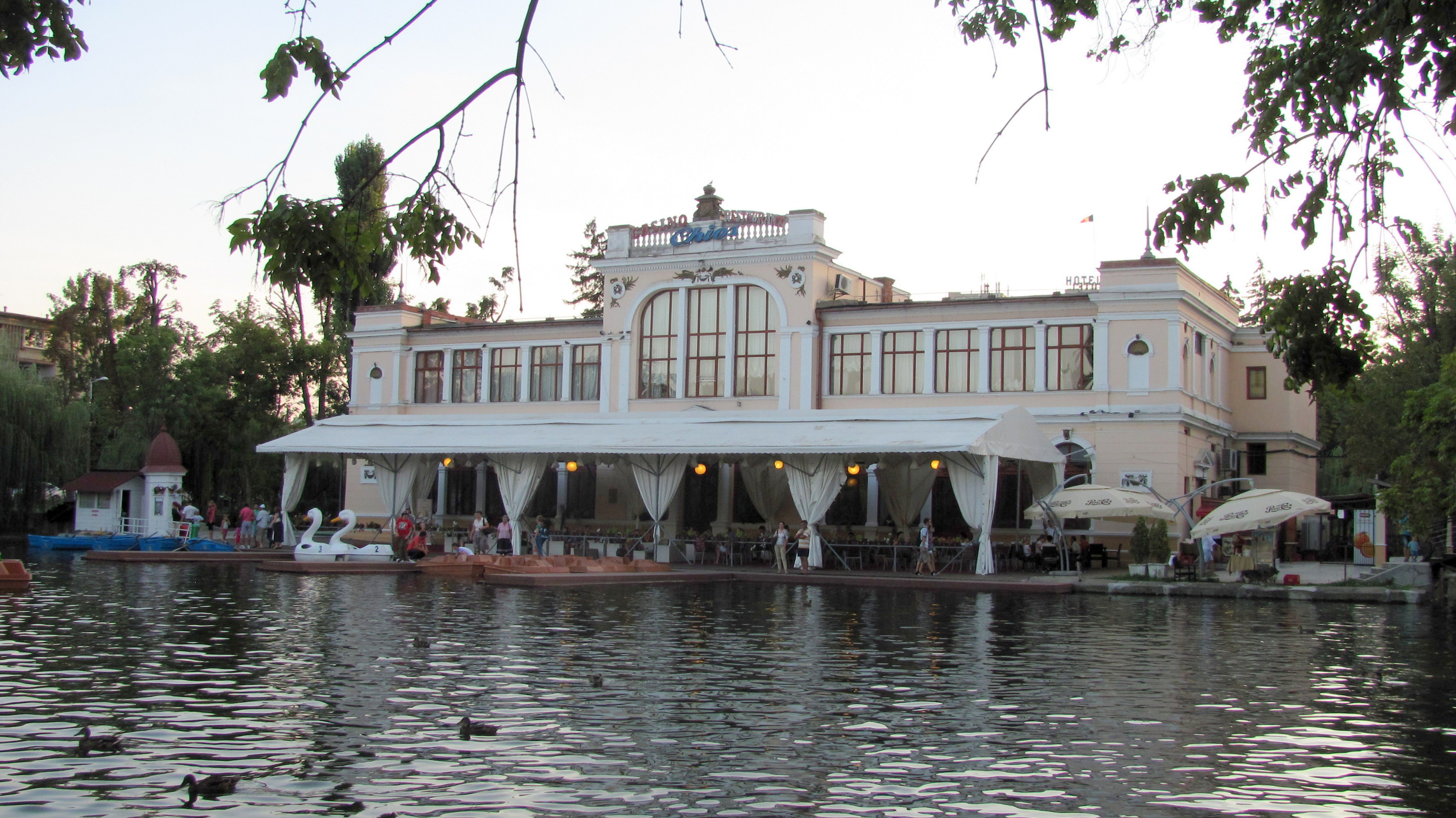 Cluj-Napoca - Parcul Simion-Bărnuțiu - Restaurantul "Chios" 04